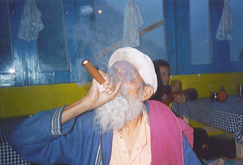 באבא הודי מעשן צ'ילום